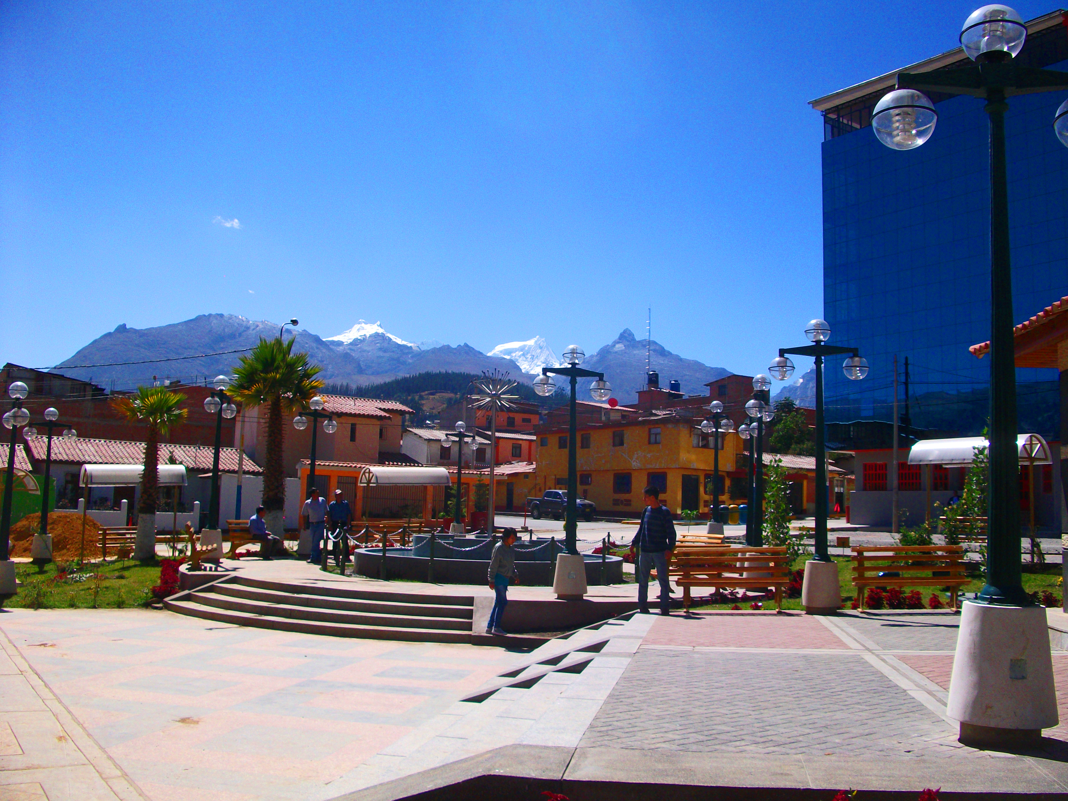 Parque Fap Huaraz